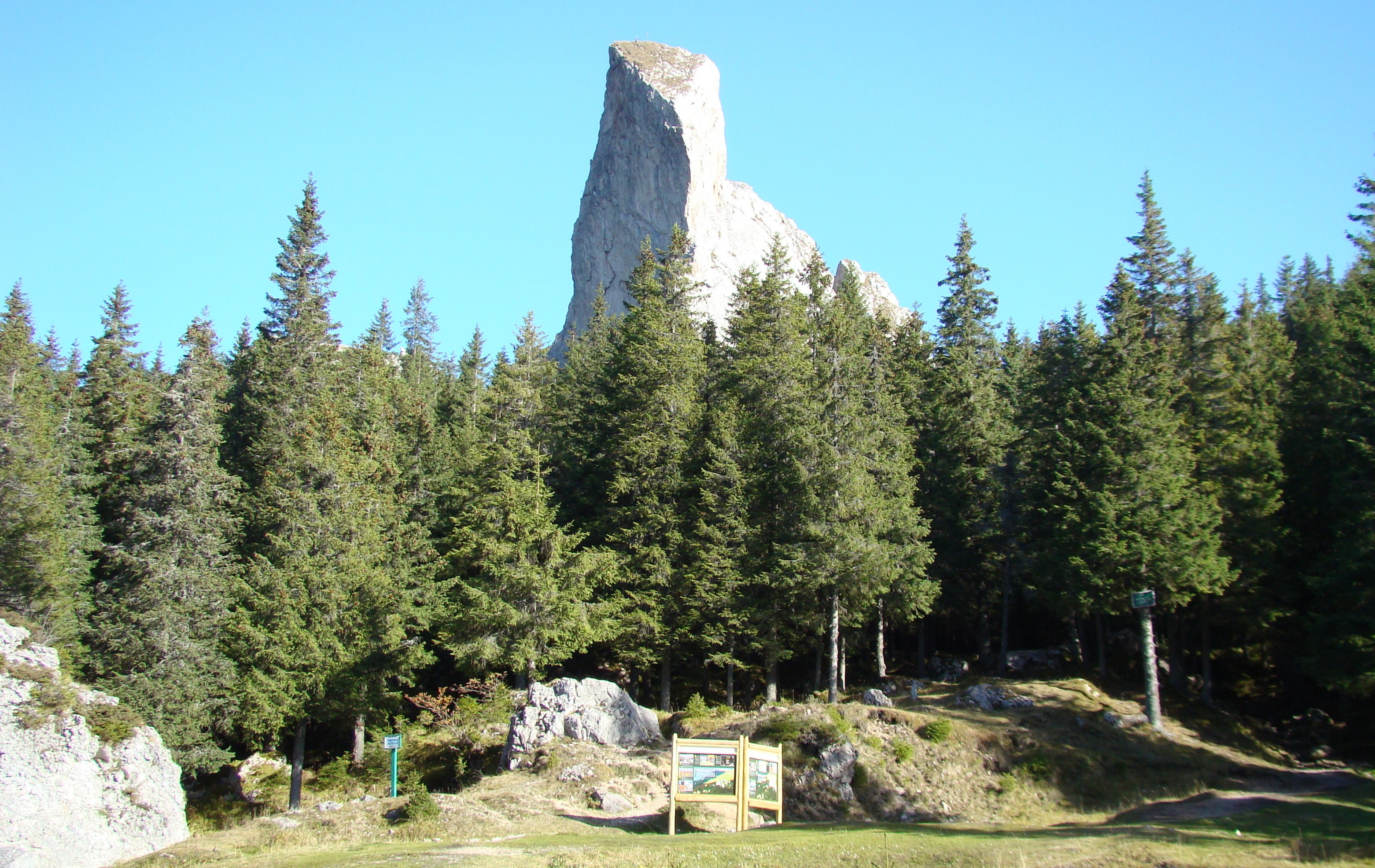 Piatra Șoimului, Munții Rarău